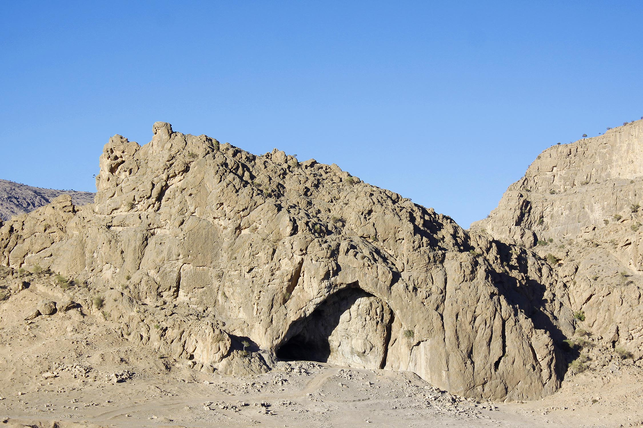 اشکفت سید خاتون